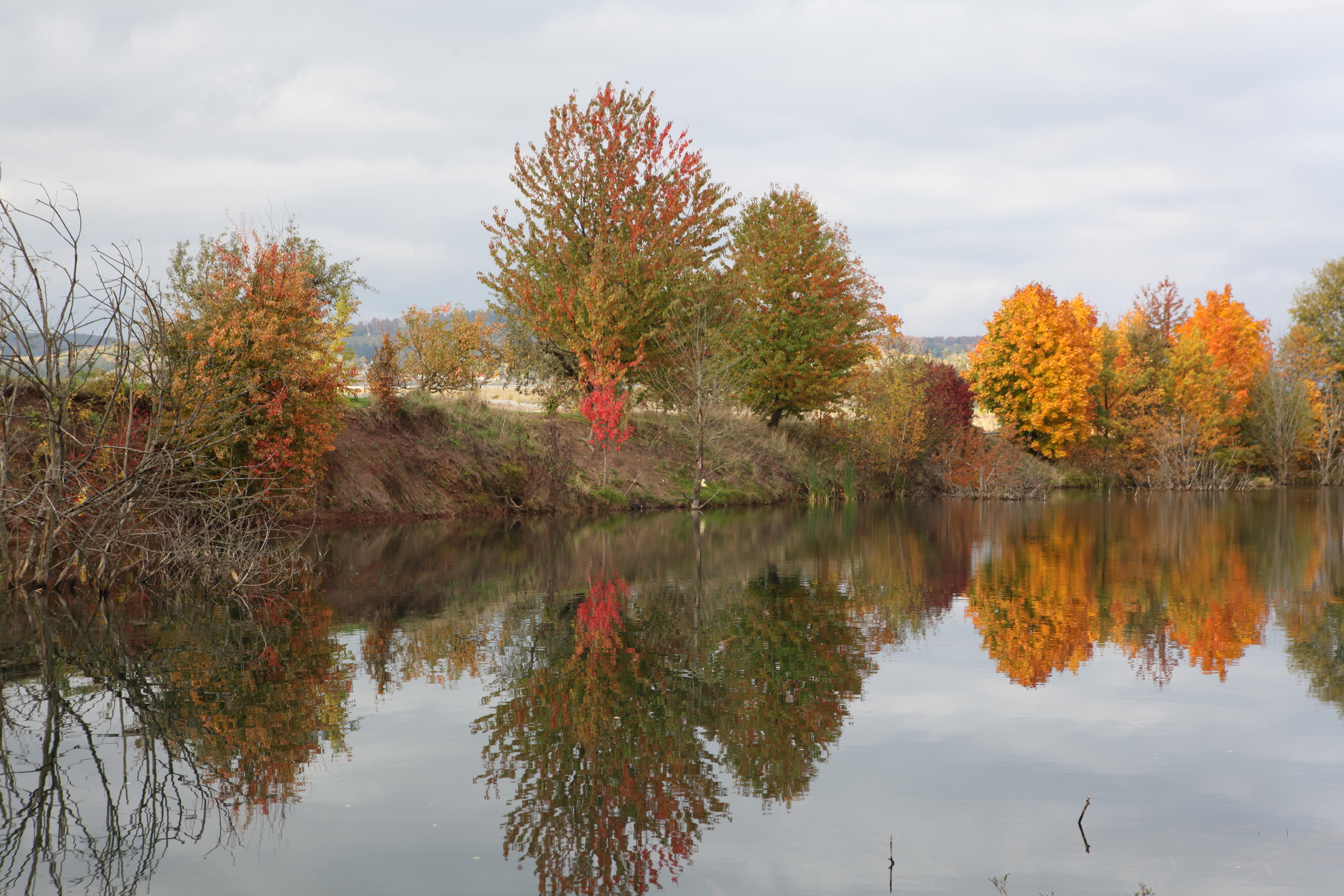 Esbacher See